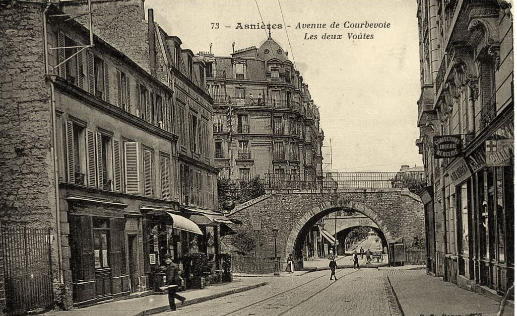 Asnieres, avenue de Courbevoie, les deux voutes, vers 1900